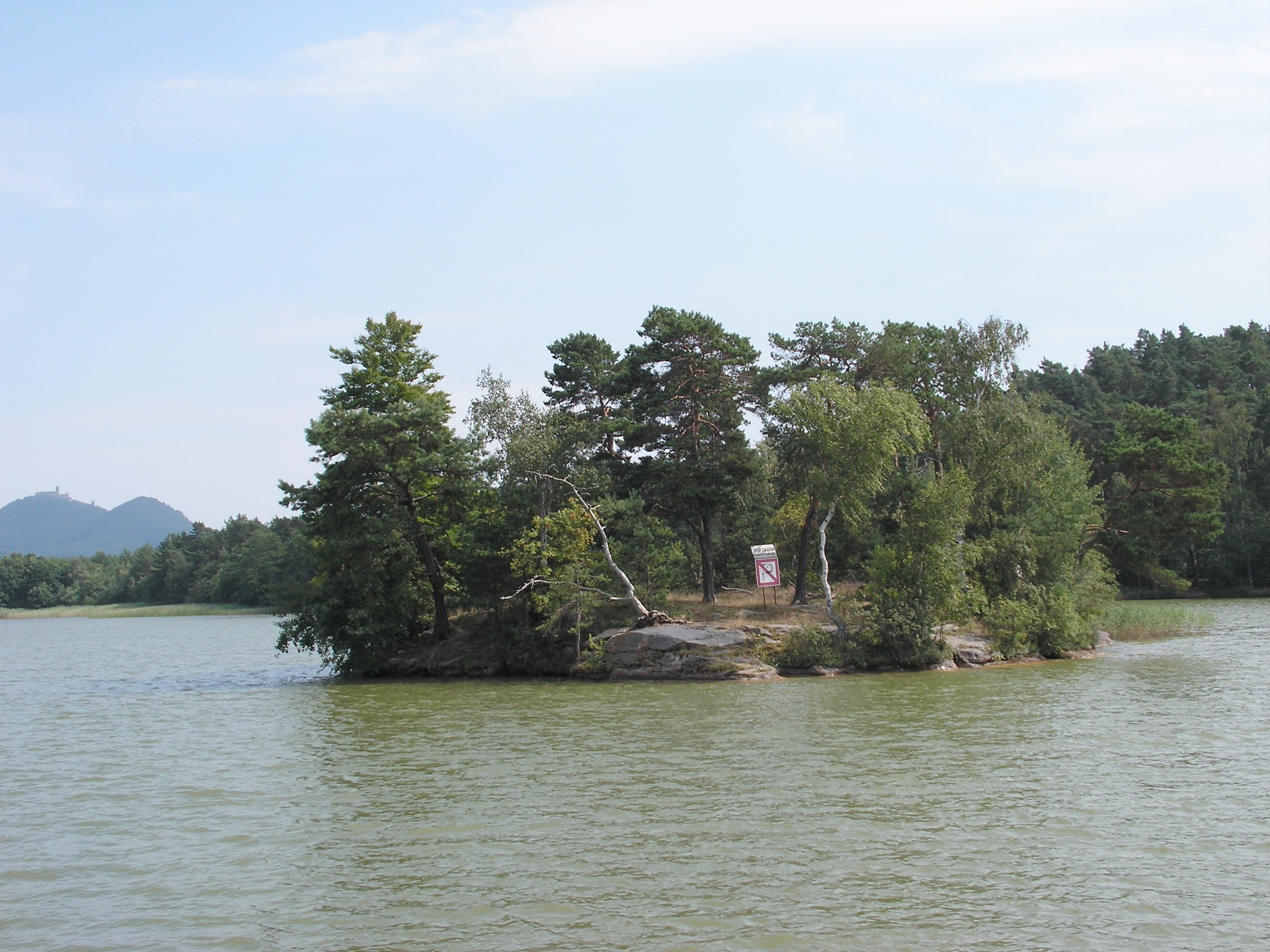 Kachní ostrov. Jeden ze dvou ostrůvků na Máchově jezeře.